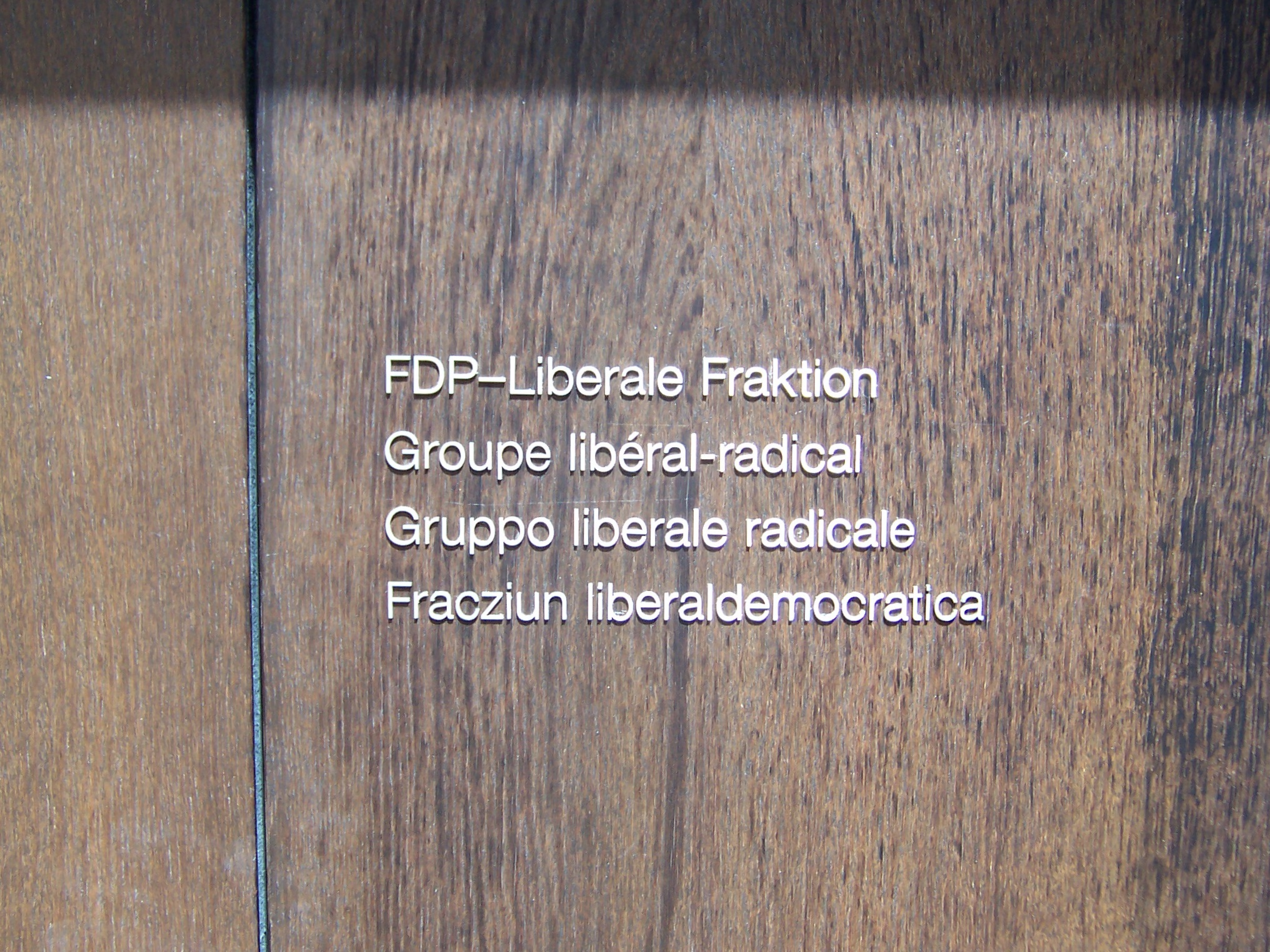 Türbeschriftung des Sitzungszimmers der FDP-Liberalen Fraktion der Schweizerischen Bundesversammlung im Berner Bundeshaus